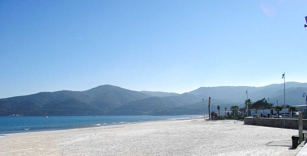 Playa de El Rinconcillo de Algeciras Fotografía de realización propia, noviembre de 2007